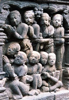 Fotograf: Michel Estermann, August 2000, GNU Freie Dokumentationslizenz